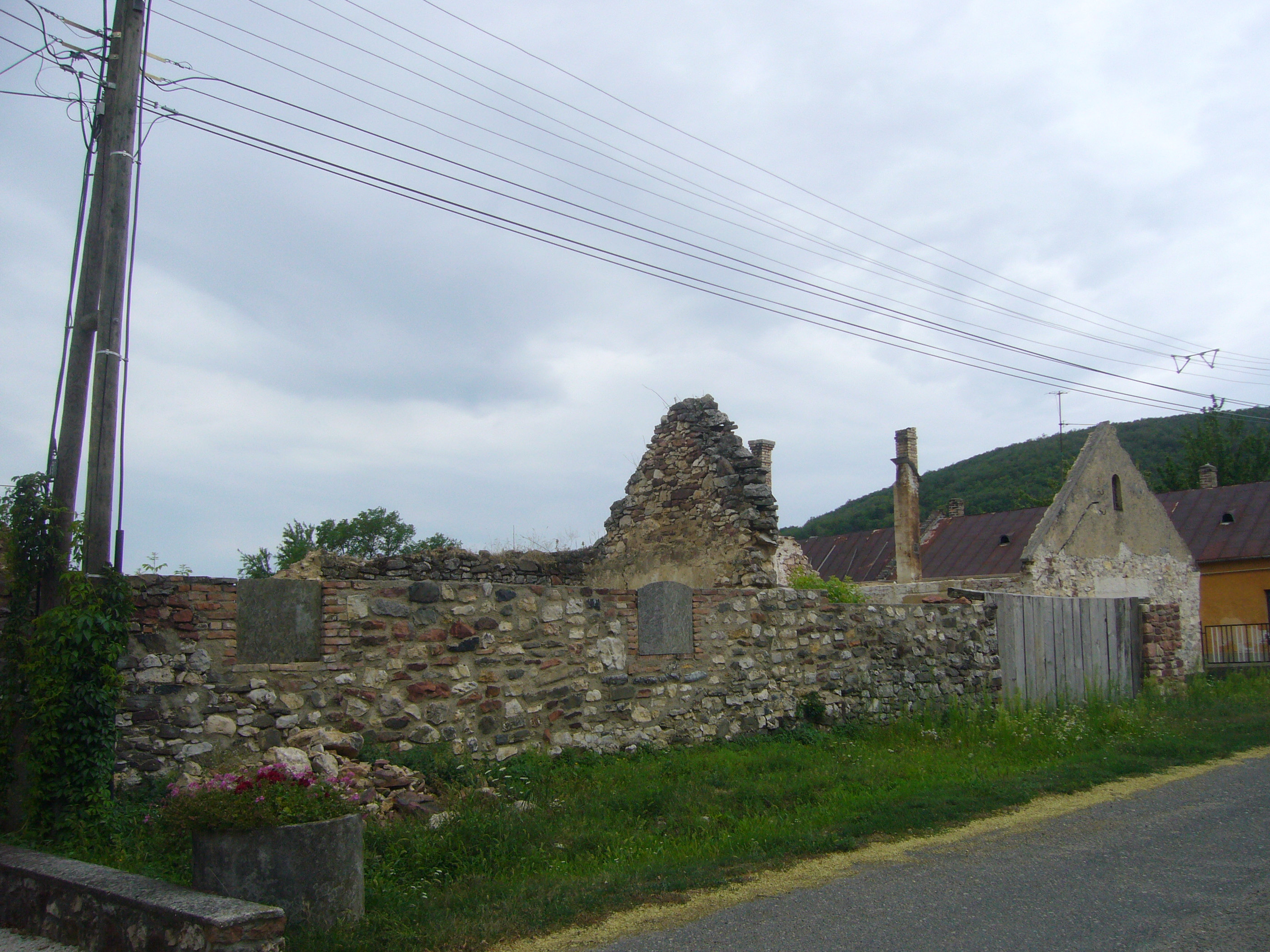 Tagyon ház